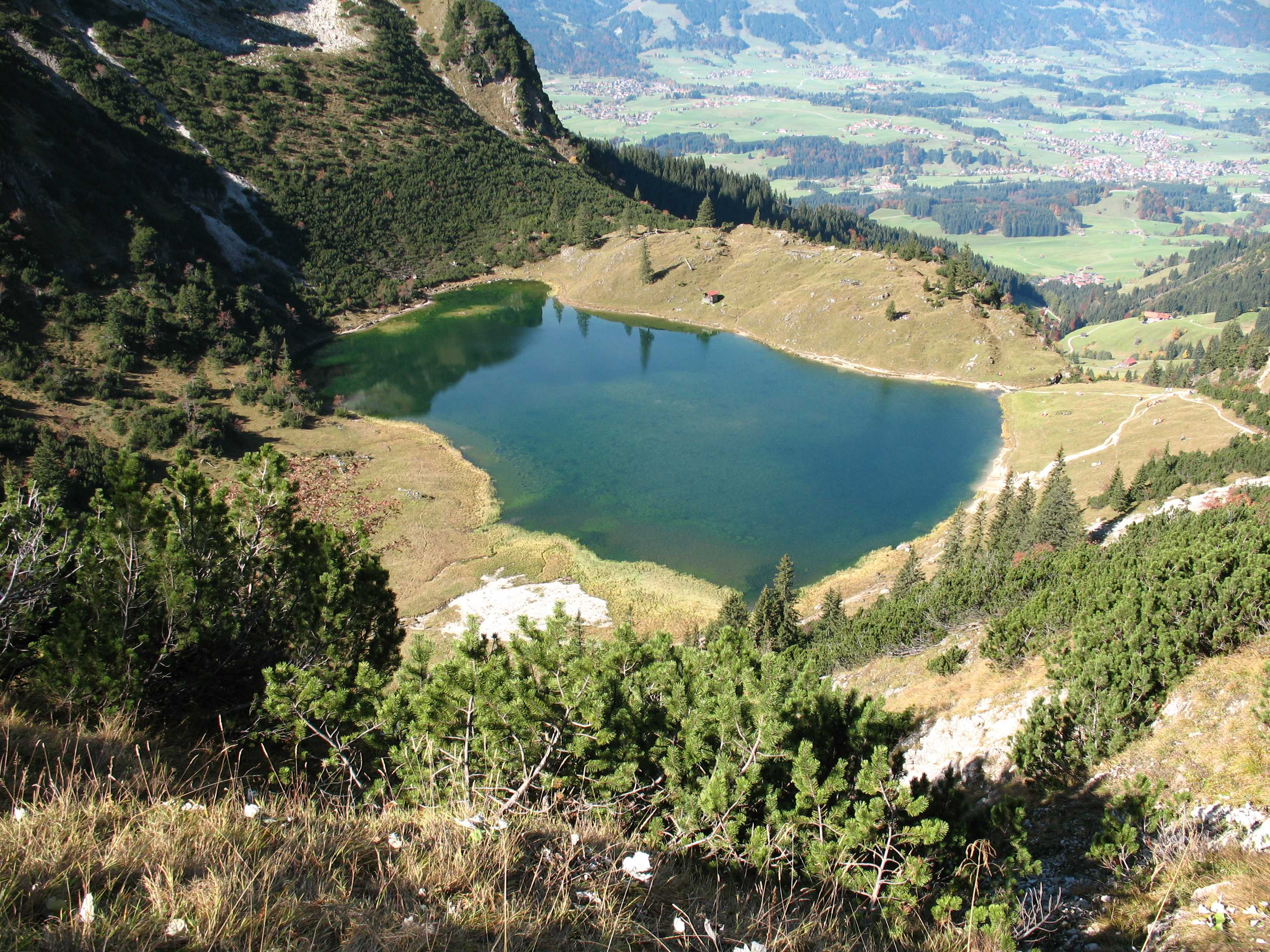 Der Untere Gaißalpsee (1508 m)